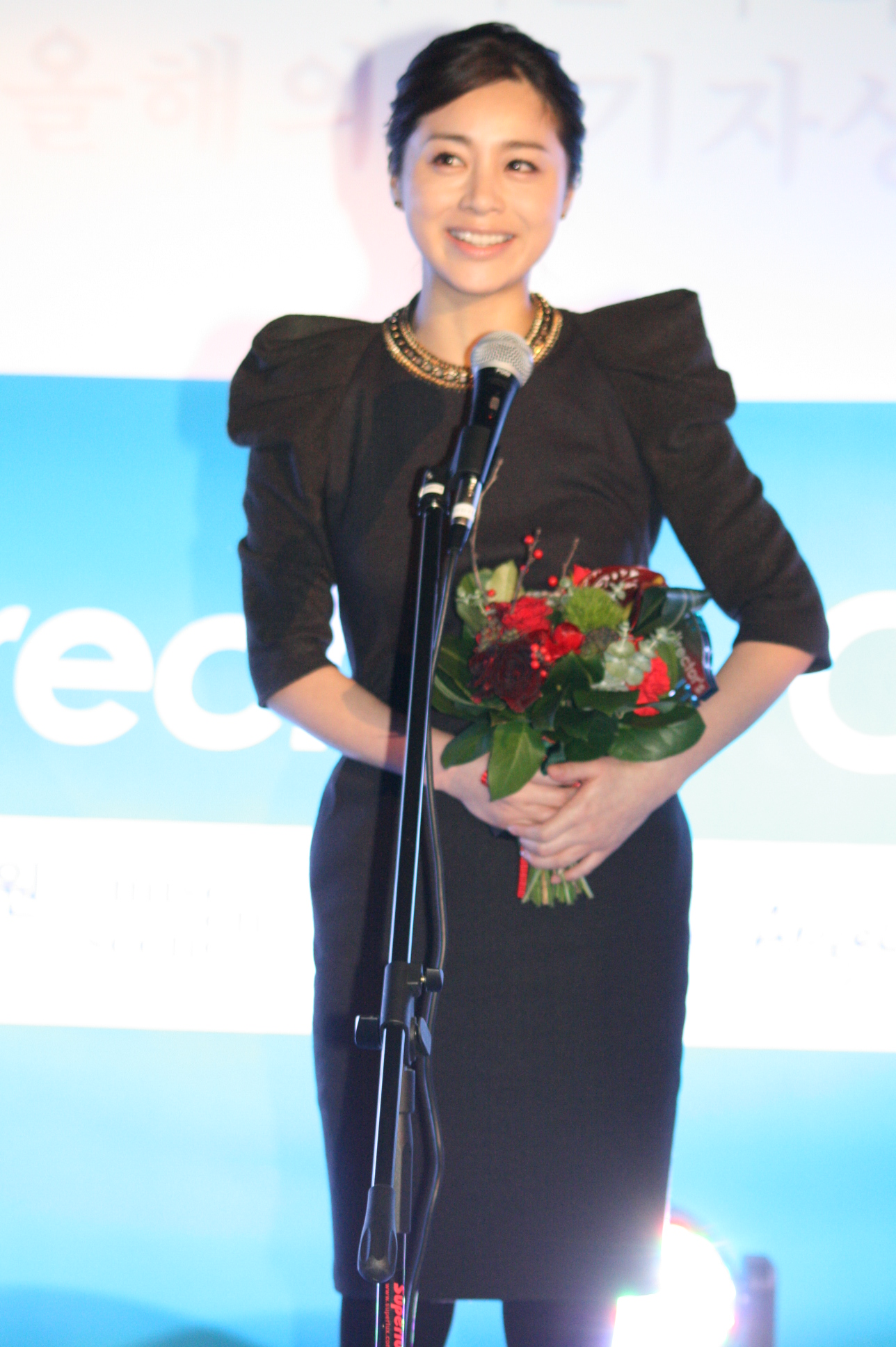 2010 디렉터스컷 시상식